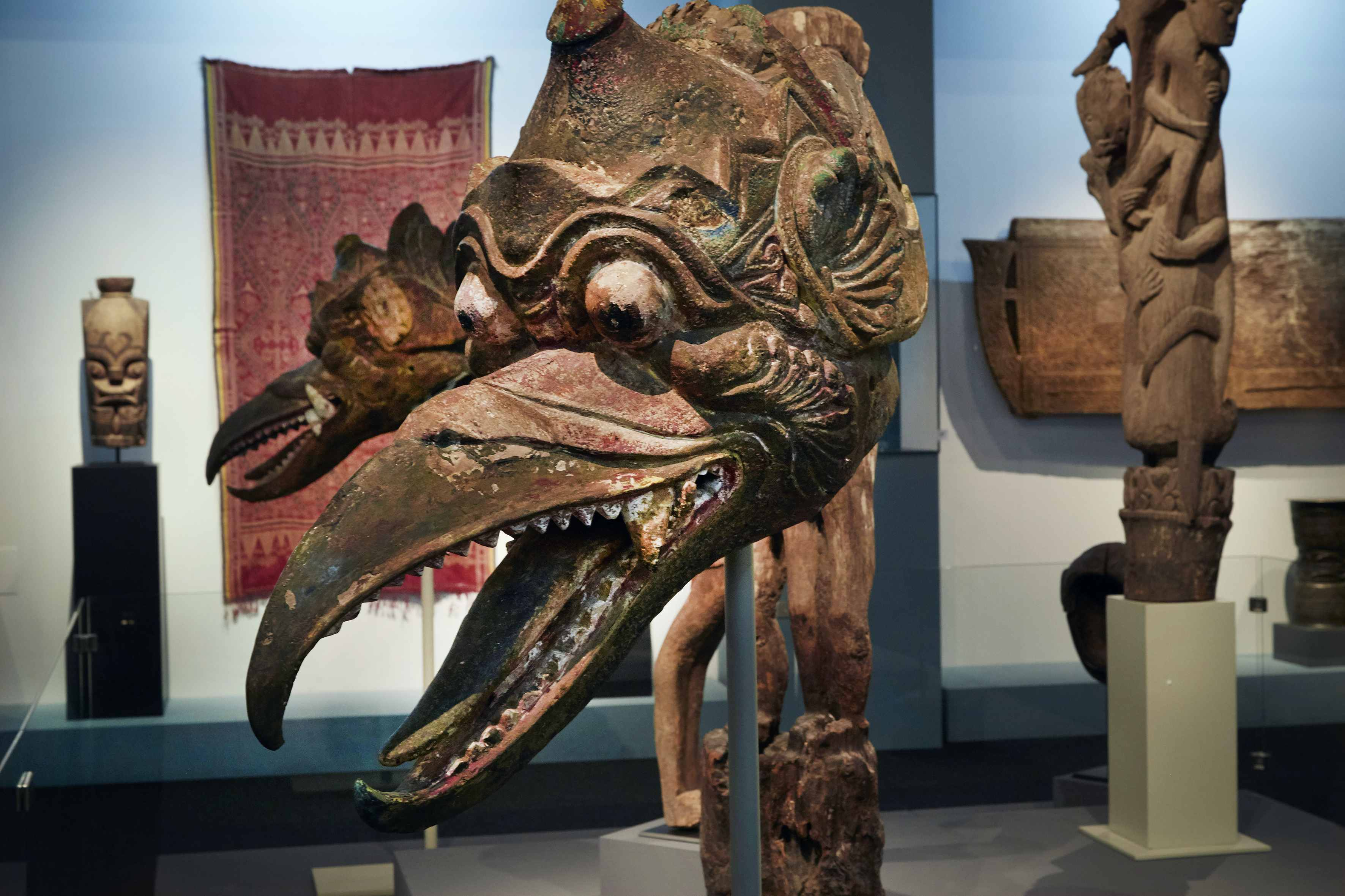 Sonderausstellung 2017